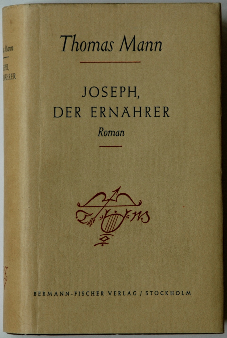 Thomas Mann: Joseph der Ernährer. Roman. Stockholm: Bermann - Fischer 1943, 645 Seiten. Erstdruck (Potempa D 8.1, Bürgin I 66, Wilpert/Gühring² 59). Orig.- Leinen 19,5 x 11,5 cm mit typographische gestaltetem Schutzumschlag.